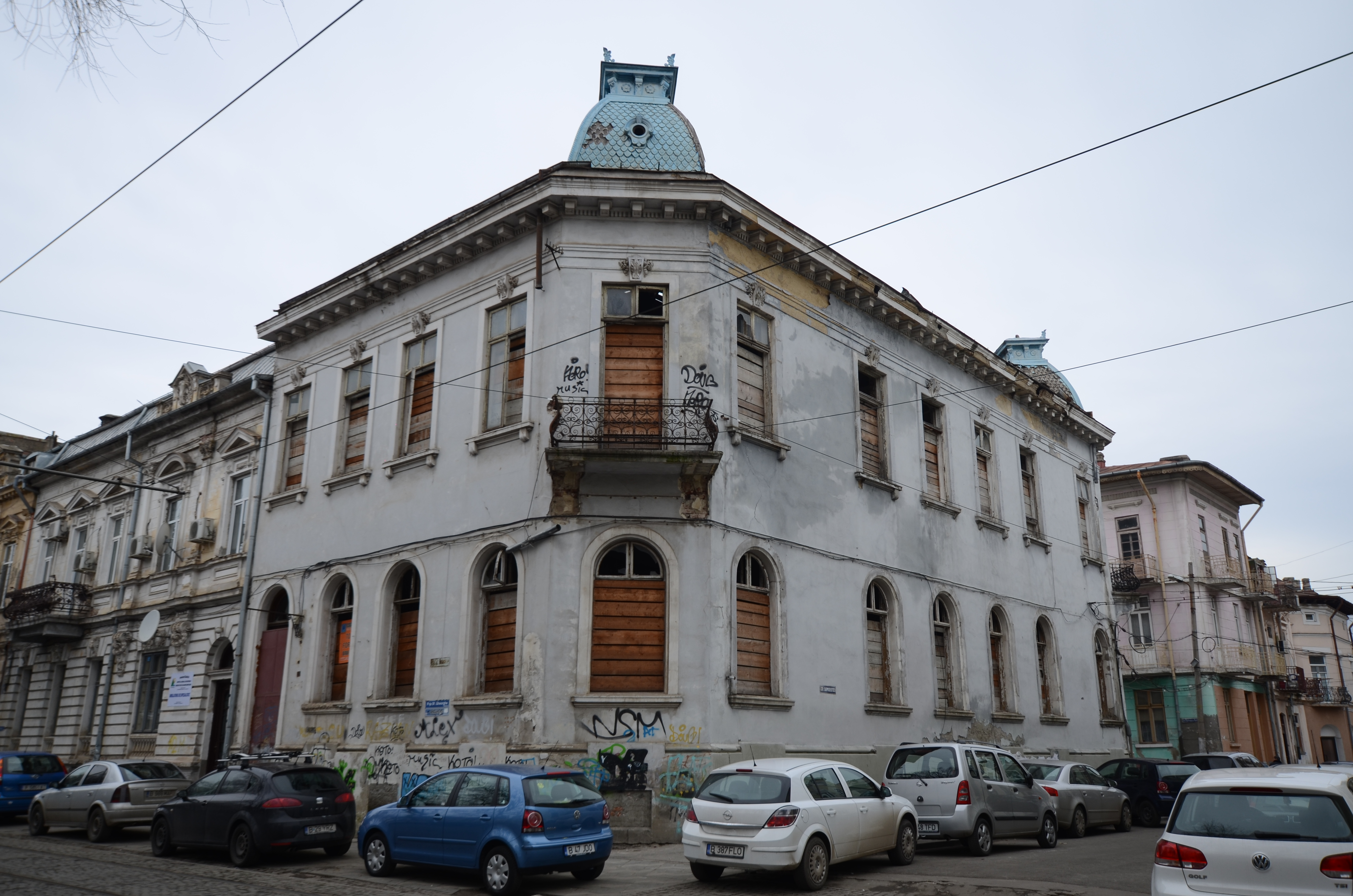 Casă, Str. Băniei nr. 21, București